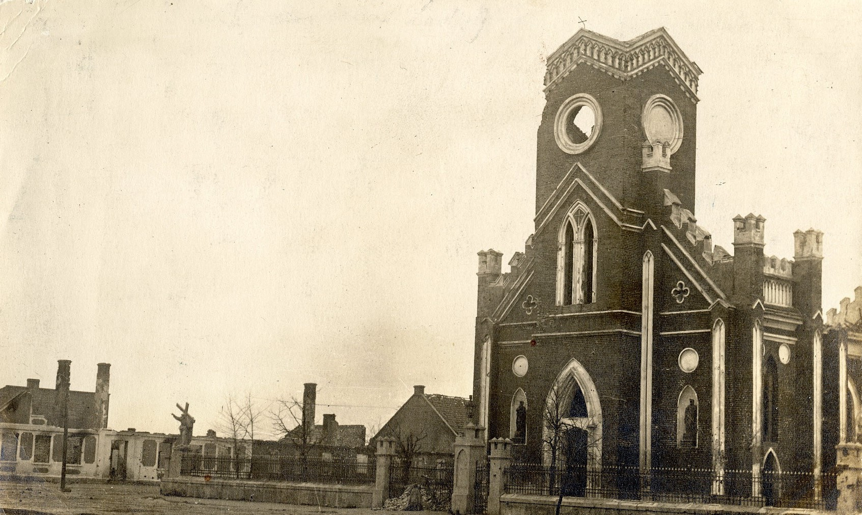 Zniszczenia powstałe w latach 1914-1915